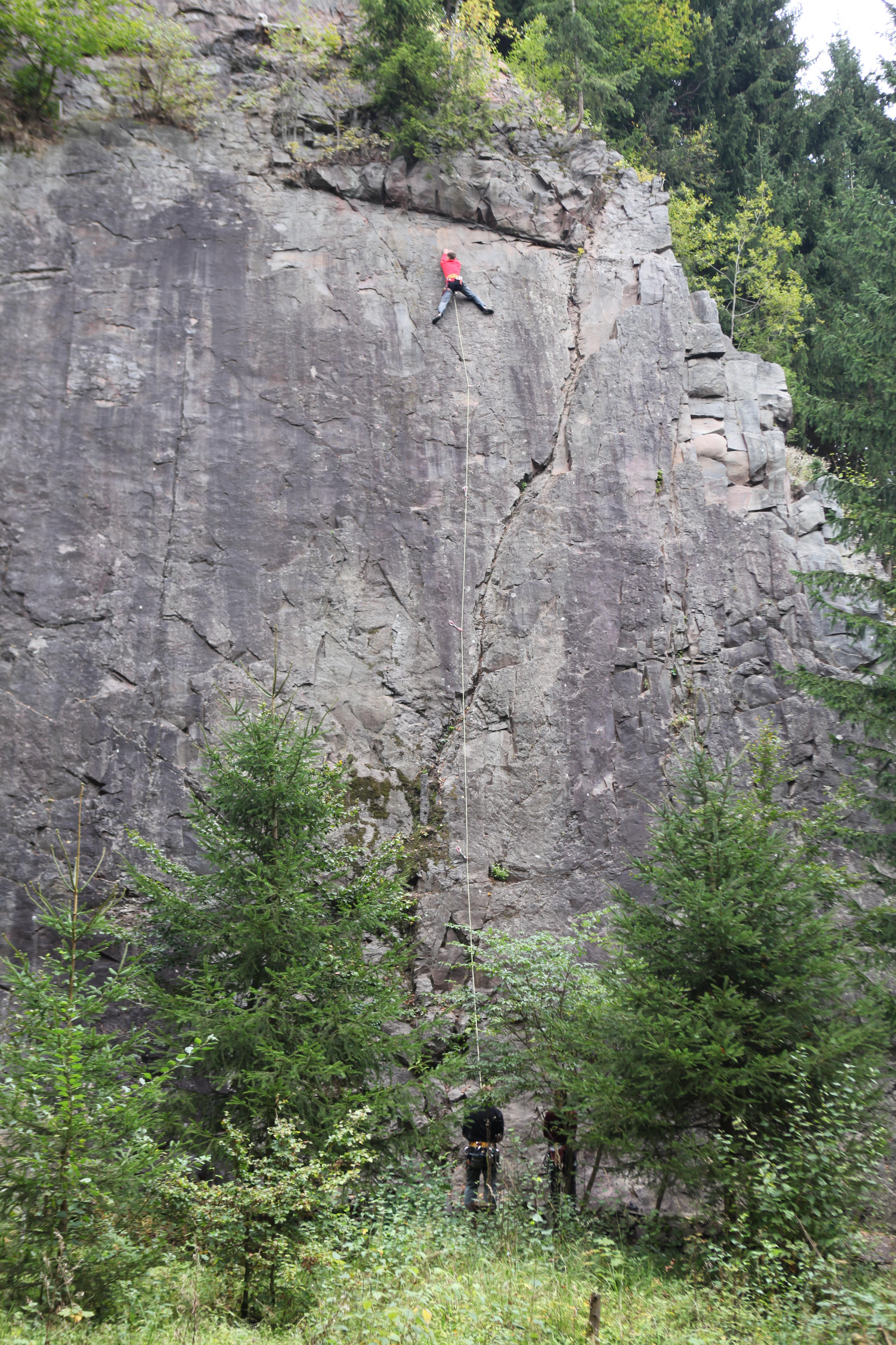 Klettergarten am Bocksberg bei Blechhammer, OT von Oberland am Rennsteig, Landkreis Sonneberg